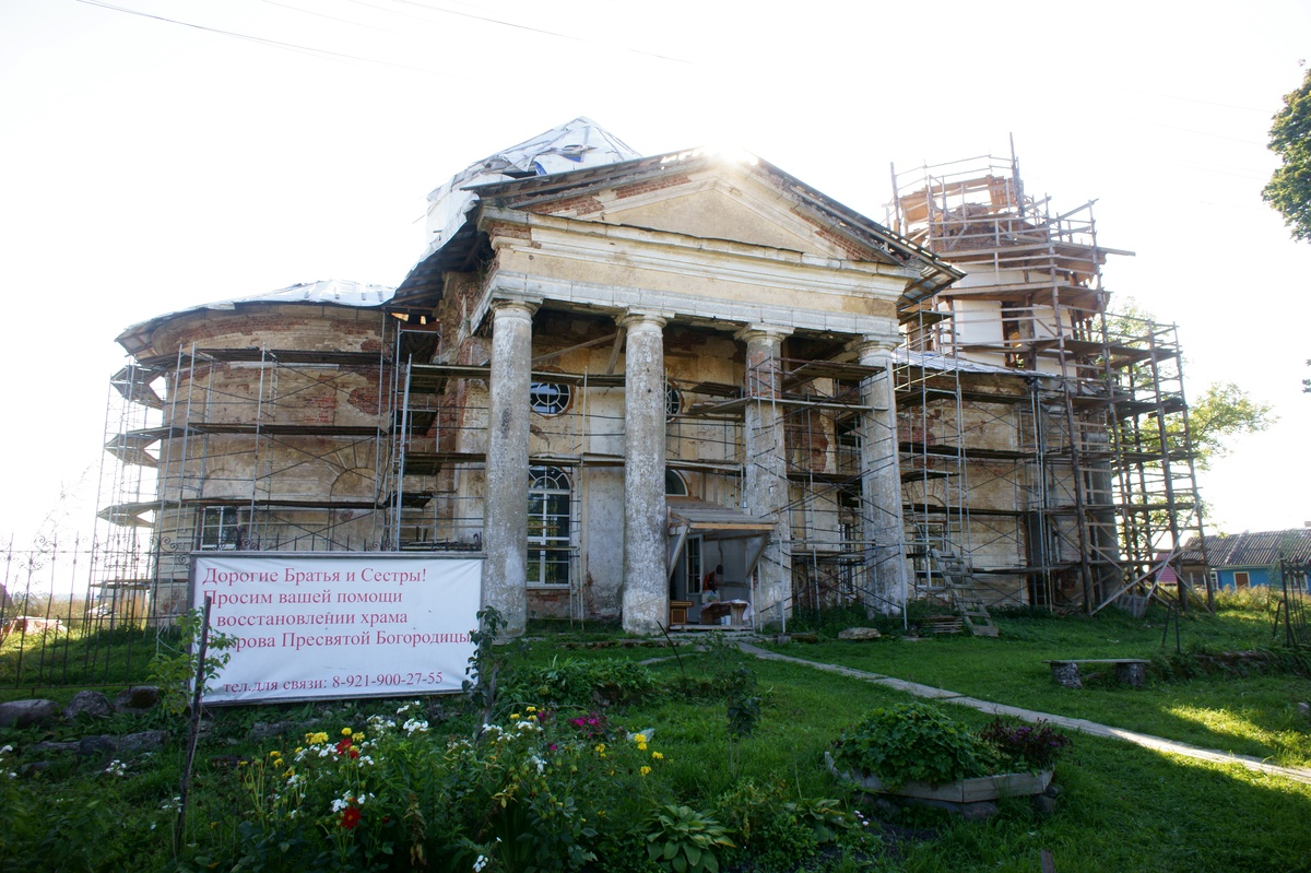 Покровская церковь (Санкт-Петербург и Лен.область, Ломоносов, деревня Дятлицы)